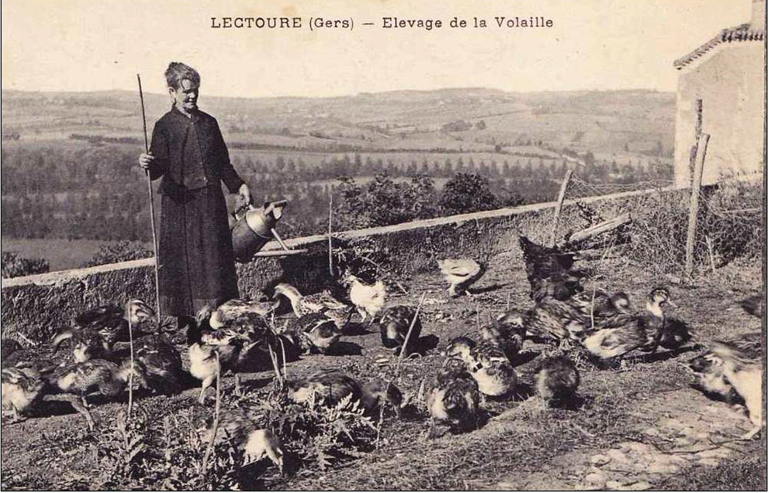 Élevage des canards à Lectoure